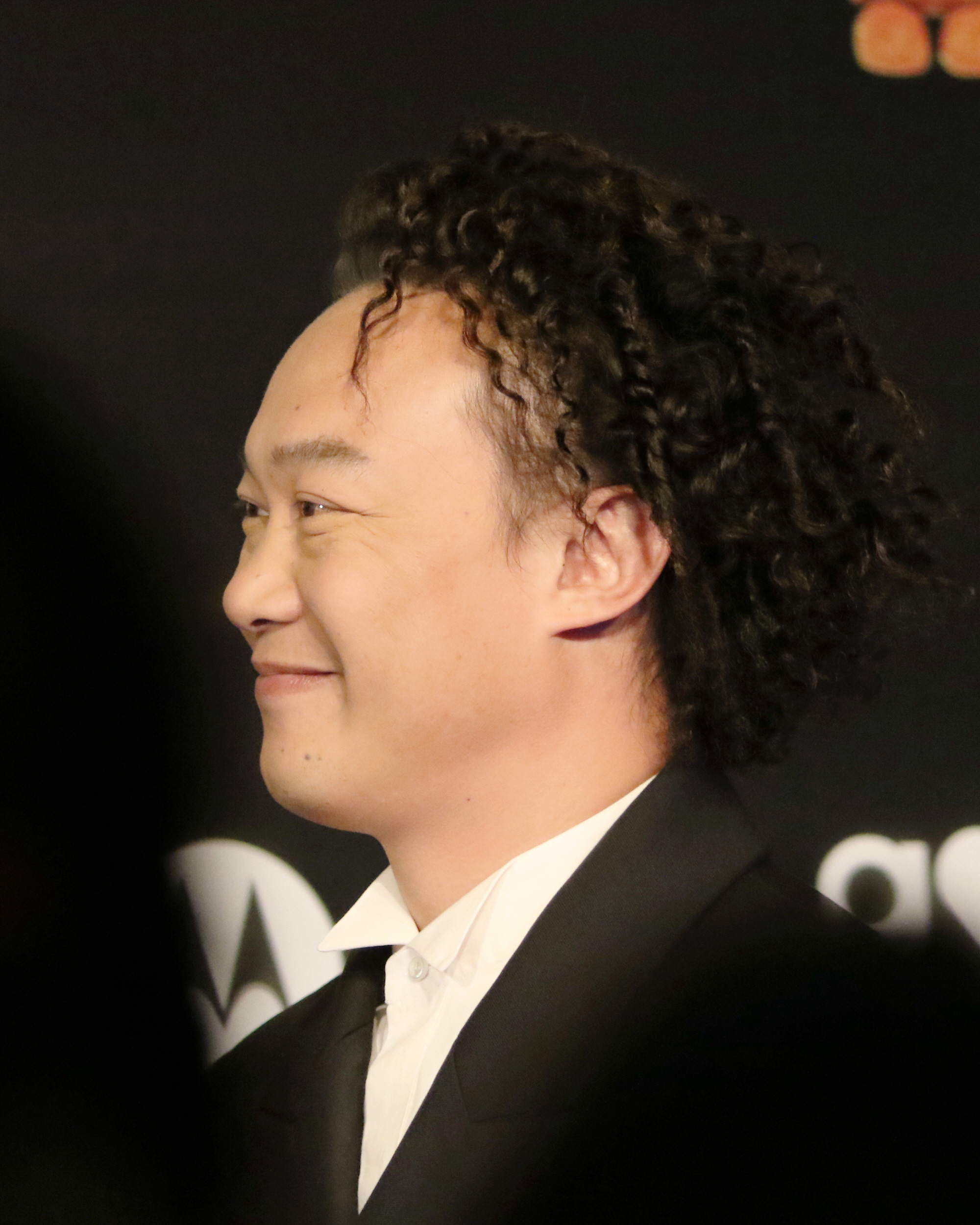 上海 咪咕颁奖礼红毯